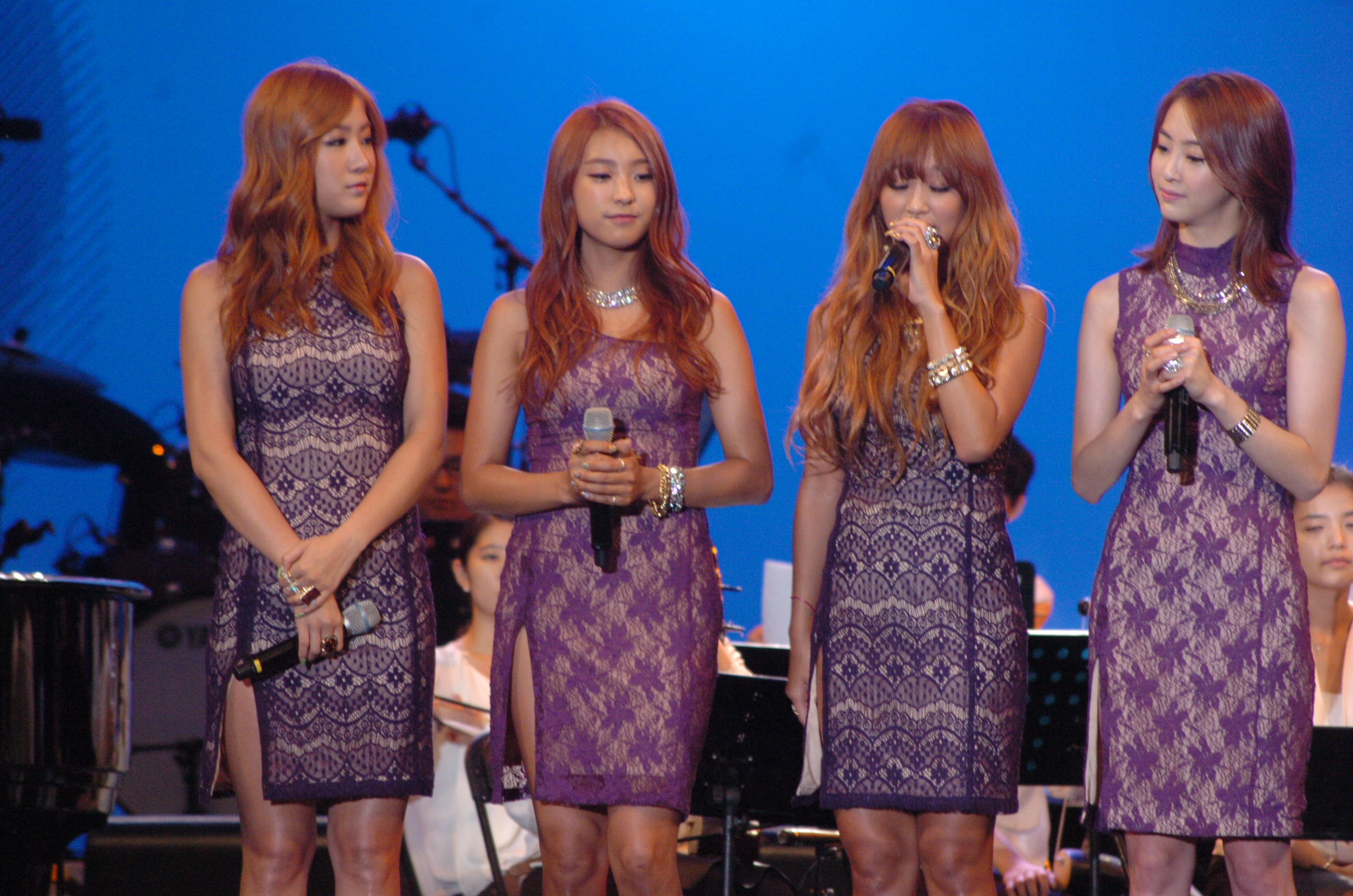 2012아리랑페스티벌 542